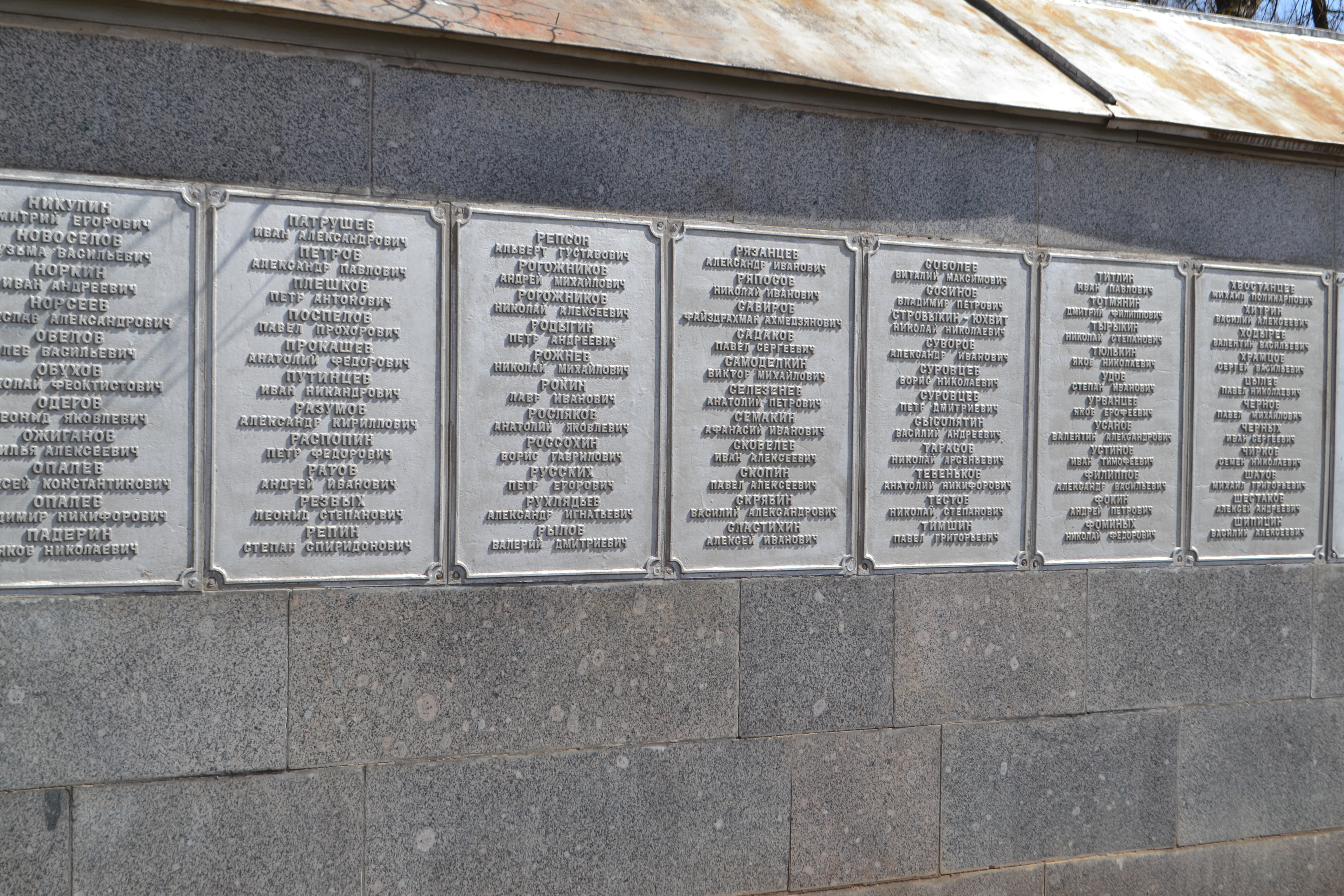 Мемориальный парк у Дворца пионеров, Киров. Вятские Герои Советского Союза (Н-Ш.). Мемориальные доски 2019 г.